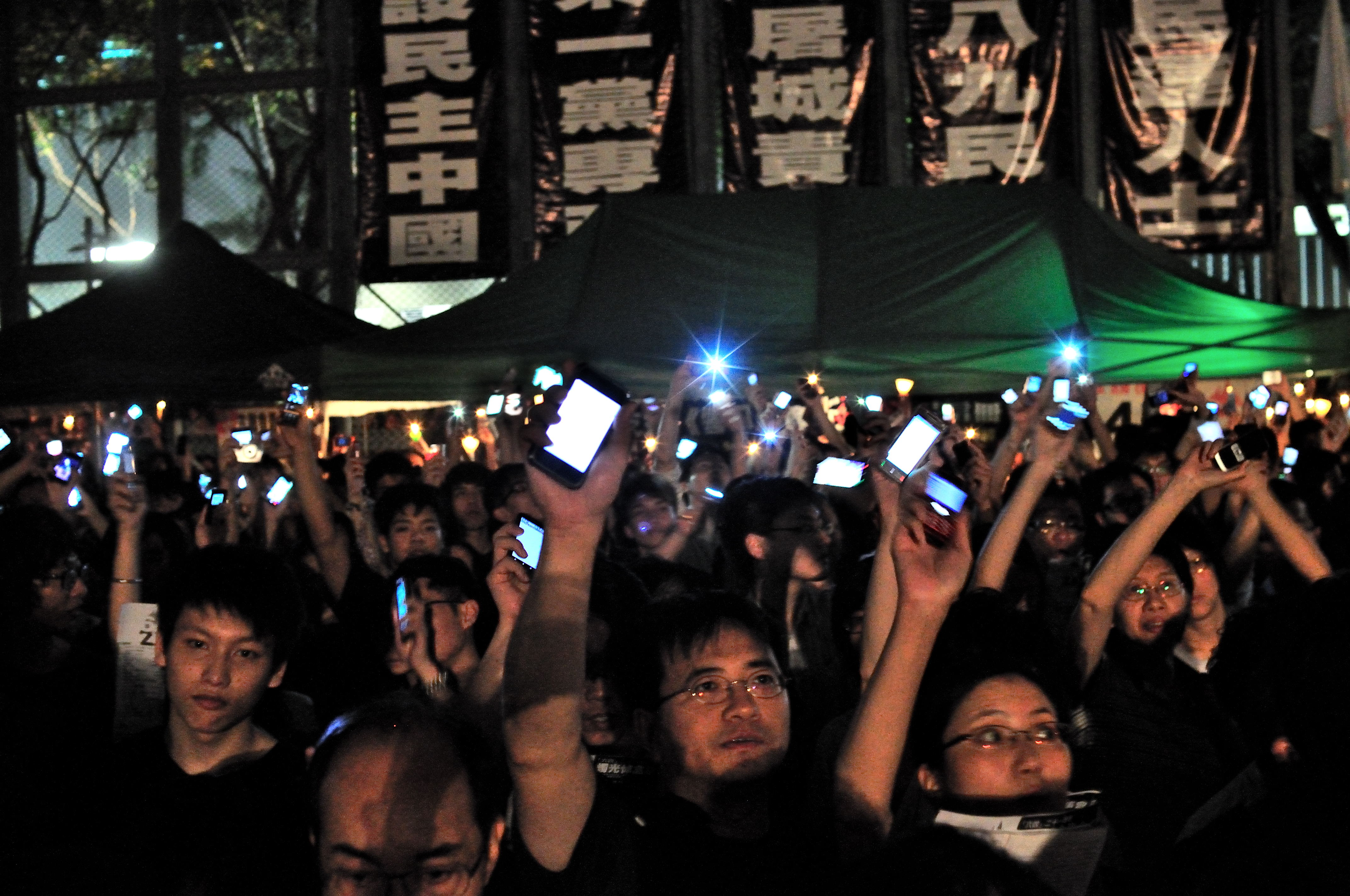 維園平反六四21週年燭光晚會 2010